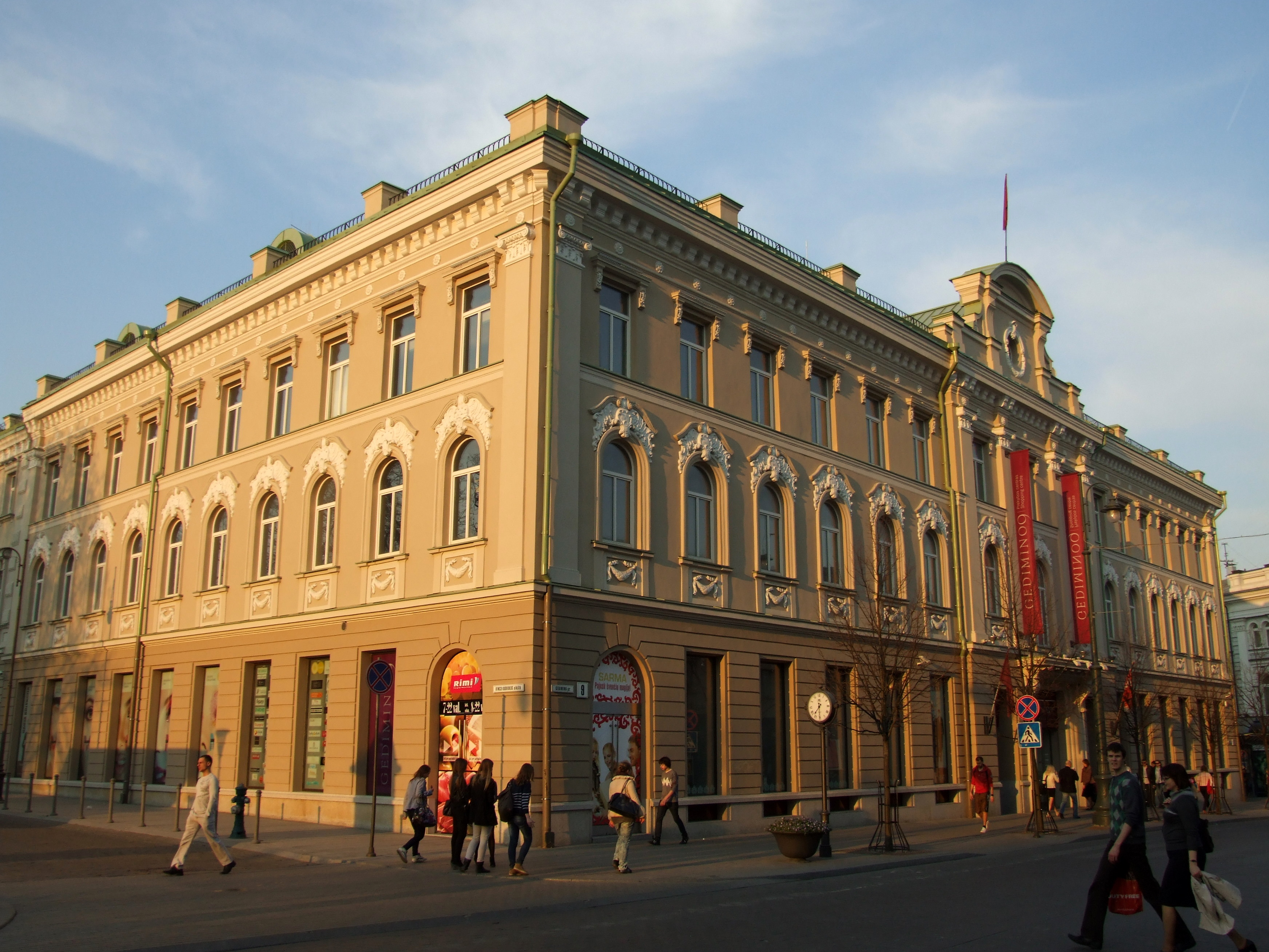 Senamiestis, Vilnius, Lithuania